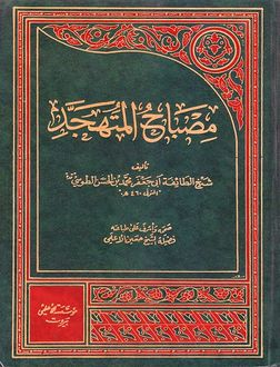 كتاب: مصباح المتهجد تأليف: شيخ الطائفة ابي جعفر محمد بن الحسن الطوسي صححه واشرف على طباعته: الشيخ حسين الاعلمي الناشر: منشورات مؤسسة الاعلمي للمطبوعات الطبعة: الاولى المصححة 1998 عدد الصفحات: 601